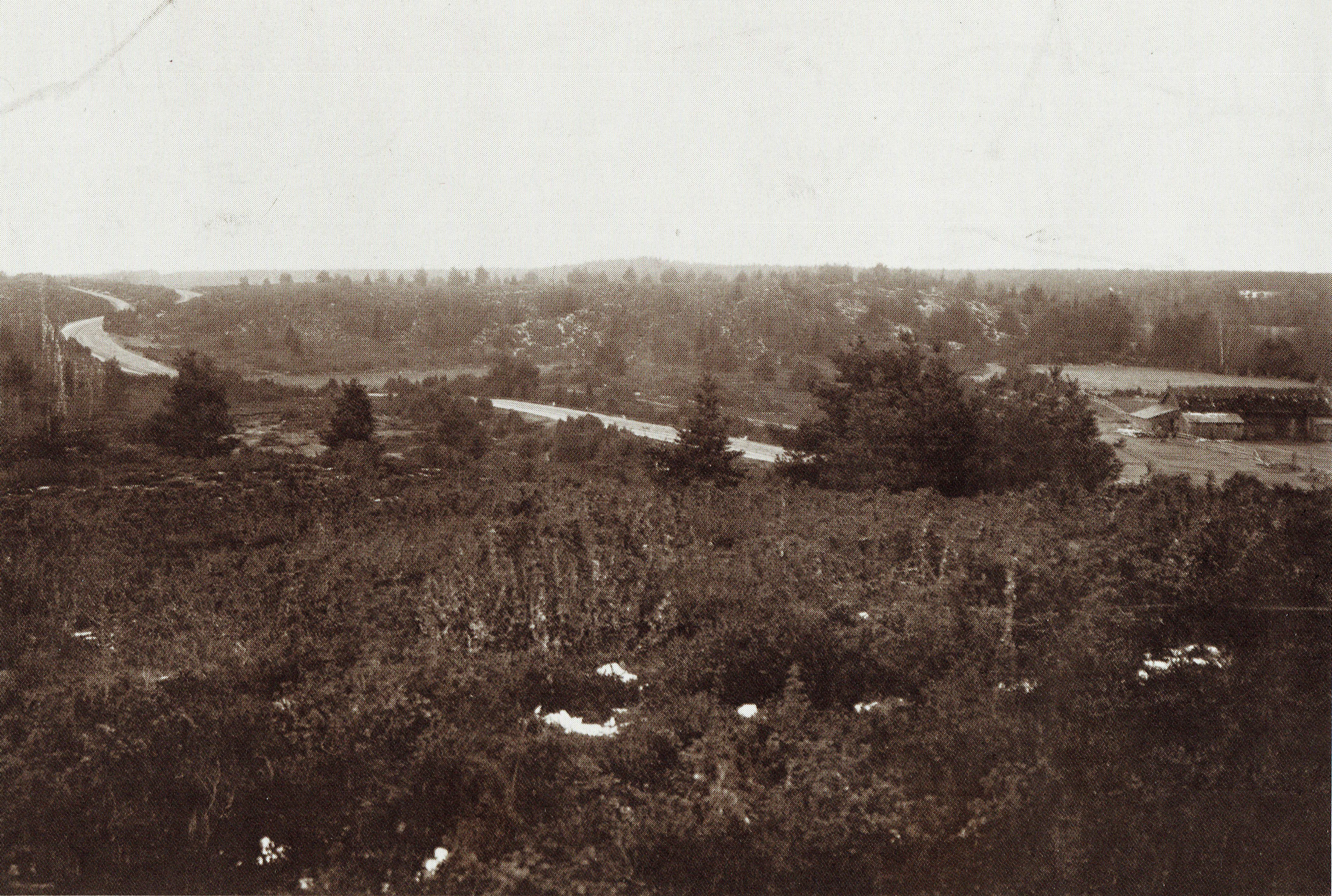 Svältorna